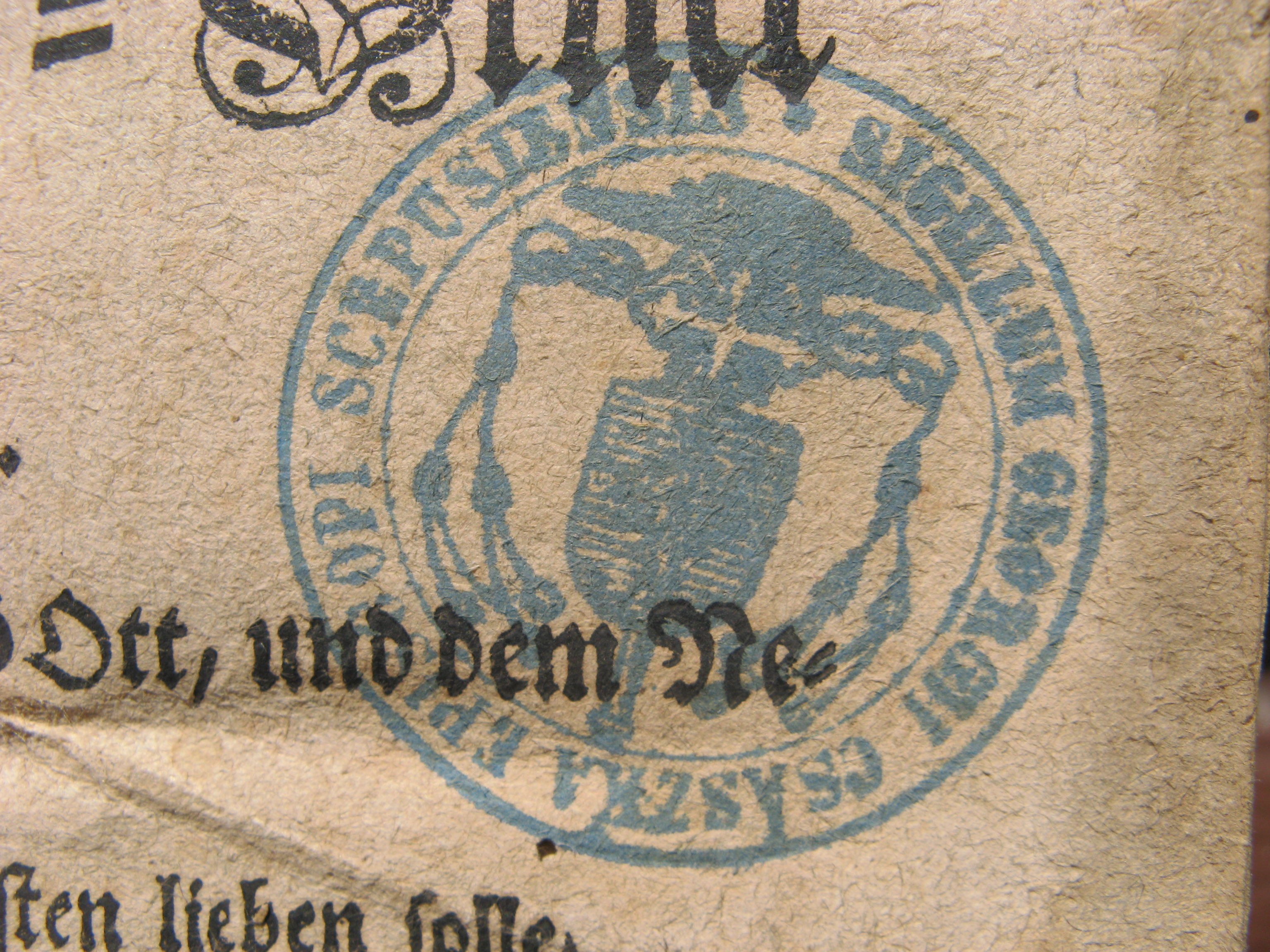 Császka György körpecsétje a zombori Kármelita Rendház egyik régi könyvében